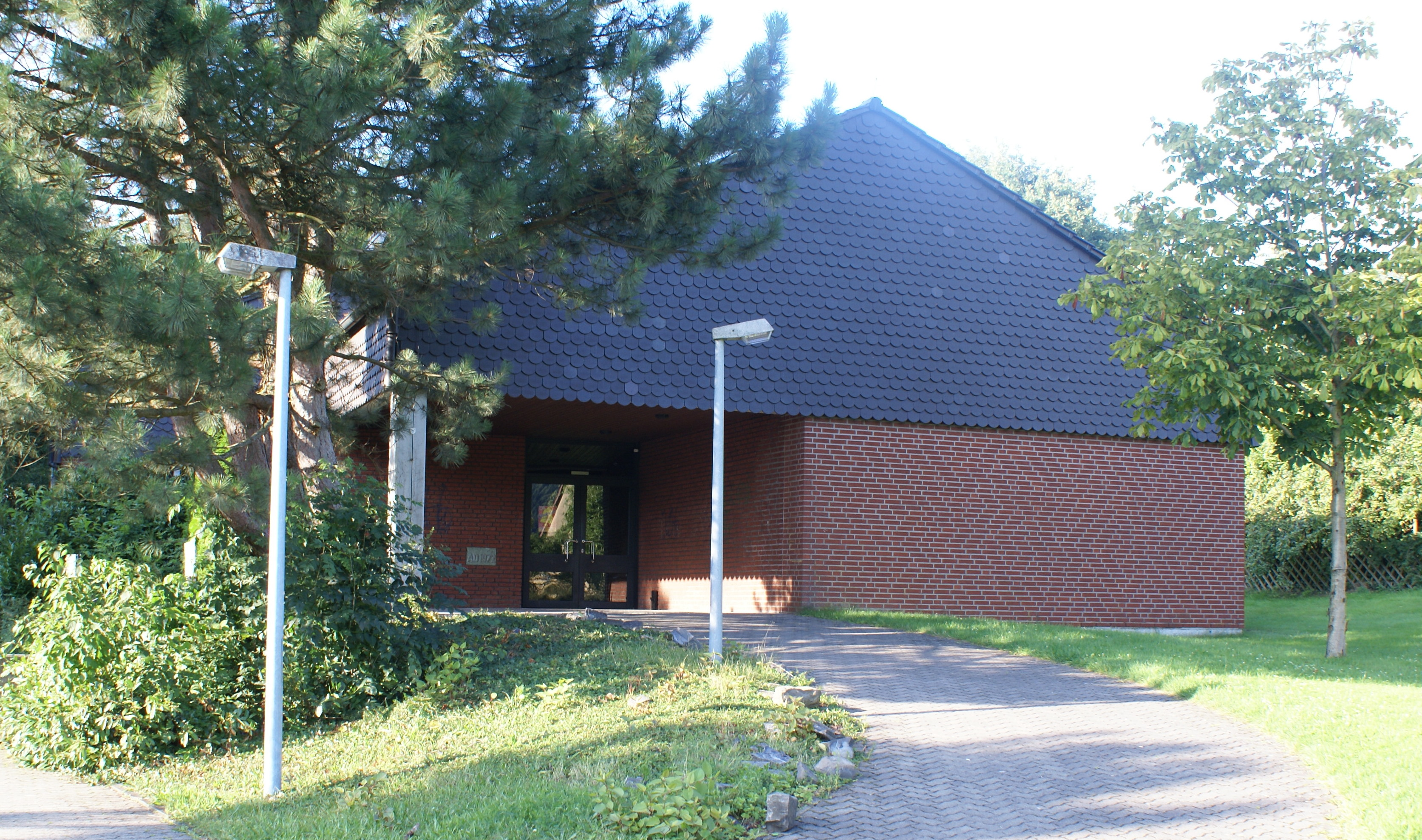 Katholisches Gemeindezentrum in Deilinghofen, Hemer